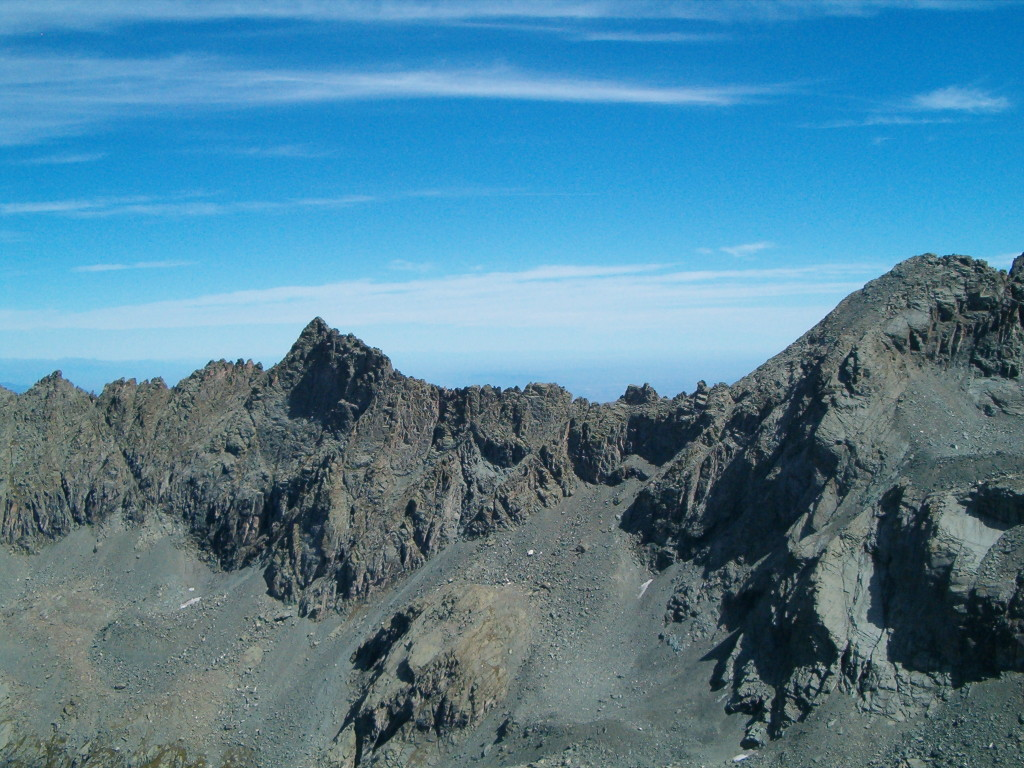 Punta Roma e la cresta verso la Punta Gastaldi visti dal Monte Losetta